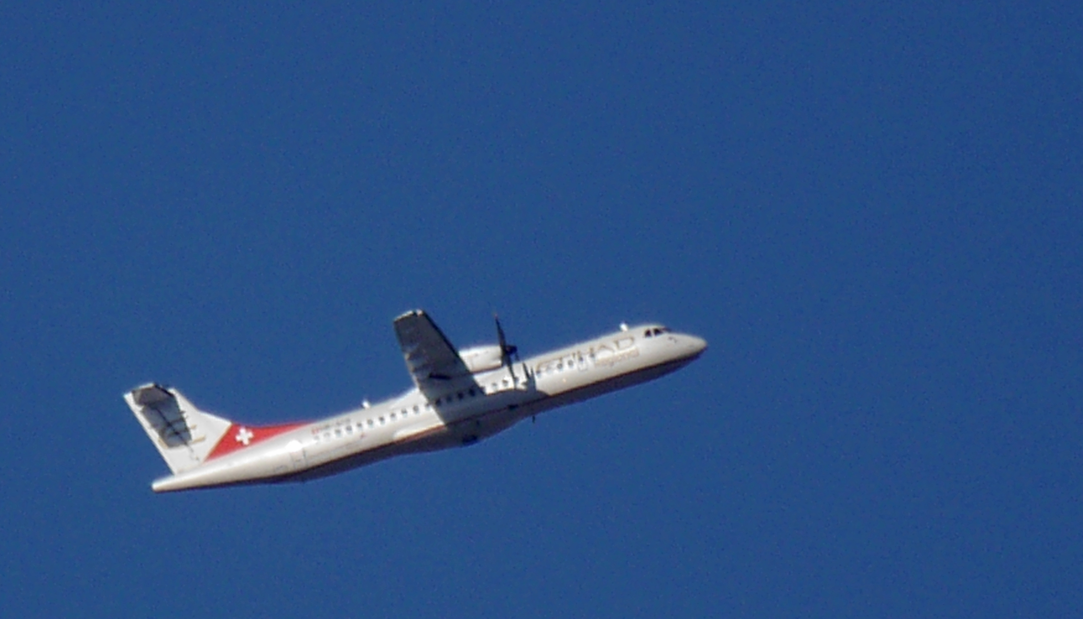 This photo was taken with Panasonic Lumix DMC-G6 camera, thanks to Panasonic. You can see all photographs in category: Taken with Panasonic Lumix DMC-G6.